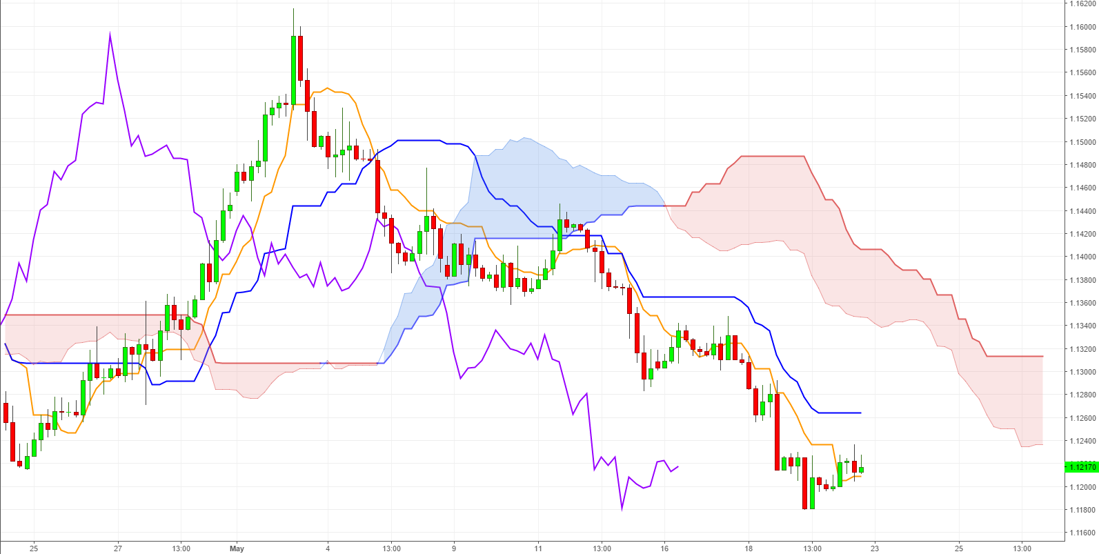 Ichimoku - vue d'ensemble